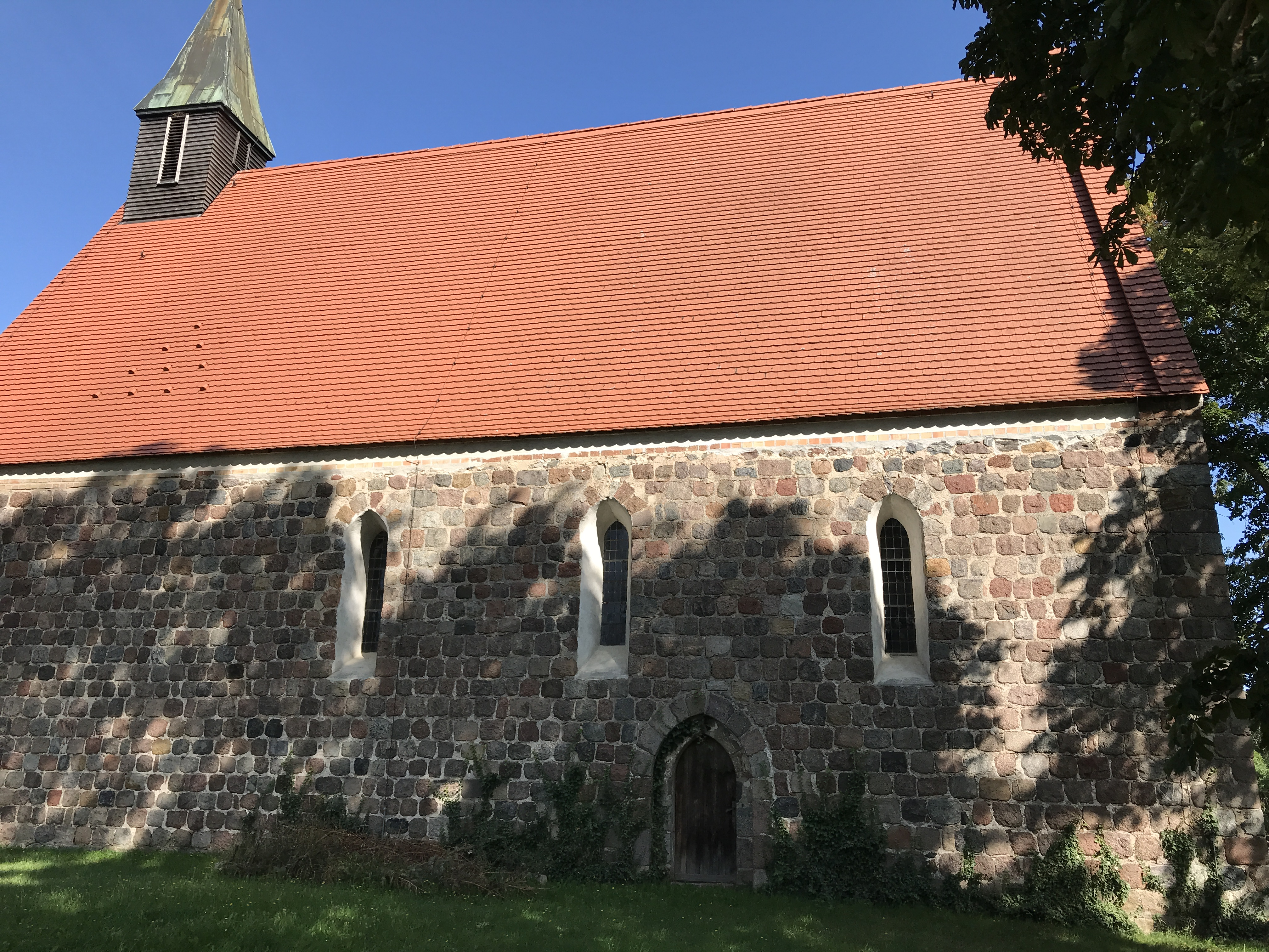 Die Kirche Dargitz ist eine Feldsteinkirche aus der zweiten Hälfte des 13. Jahrhunderts in Schönwalde im Landkreis Vorpommern-Greifswald im Land Mecklenburg-Vorpommern. Im Innern steht unter anderem ein Altaraufsatz aus dem Anfang des 18. Jahrhunderts.